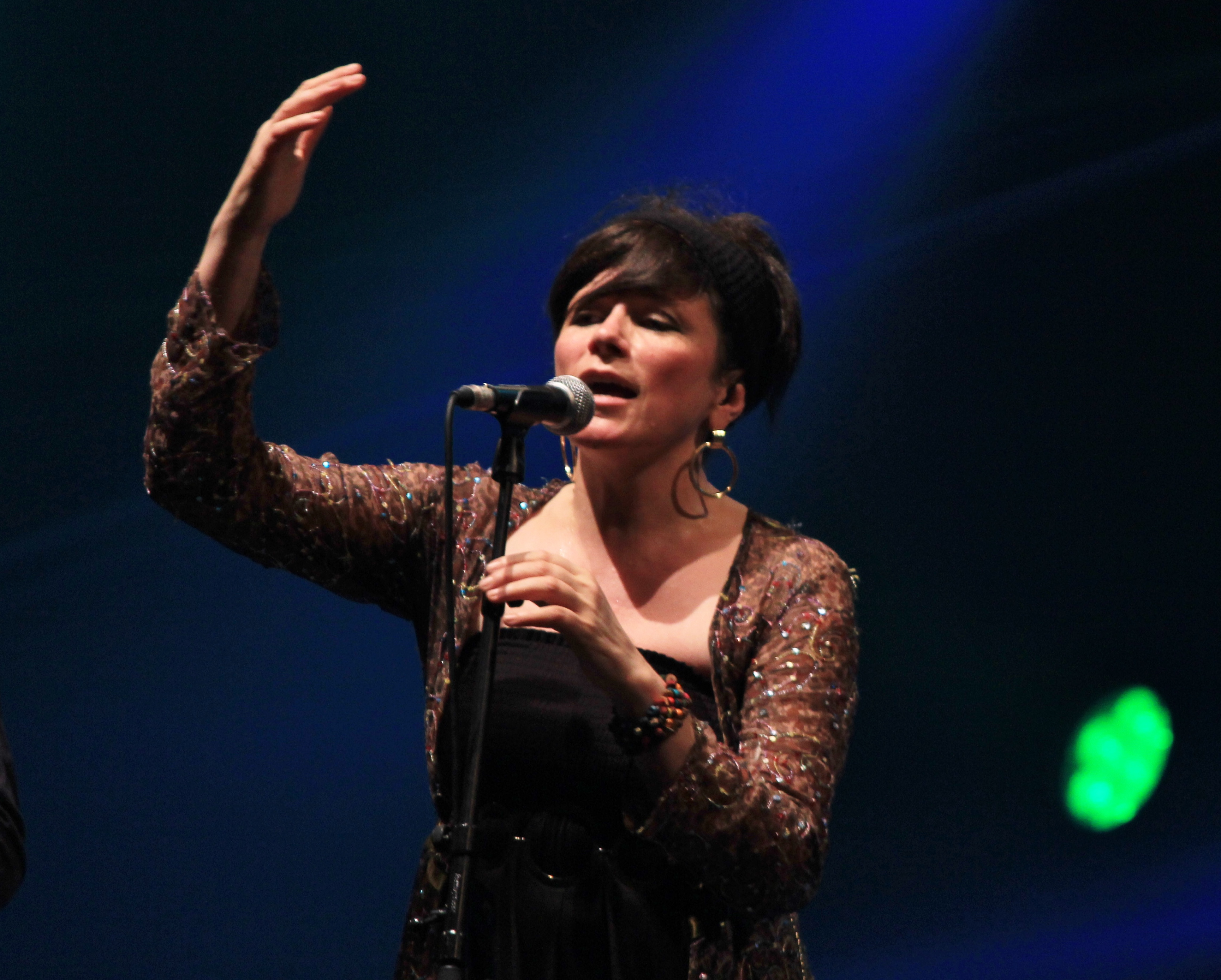 Concert du groupe Dervish lors du festival interceltique de Lorient 2014.